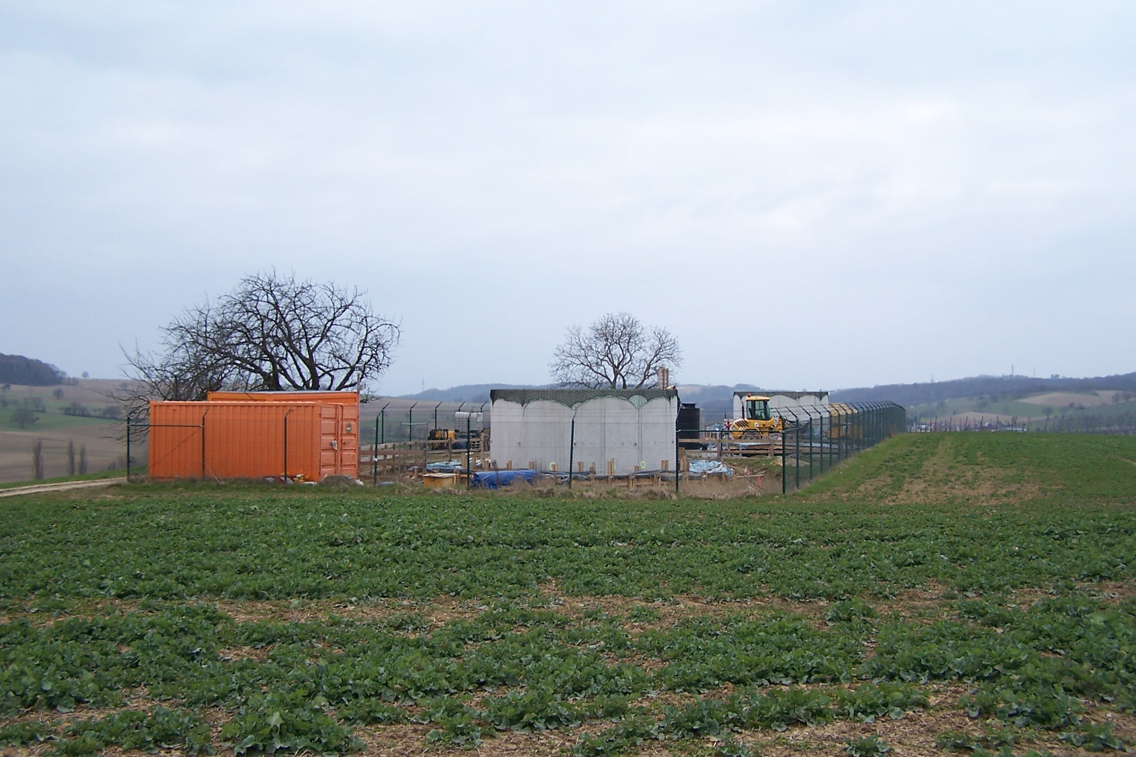 Lüftungsschacht des Katzenbergtunnels Oströhre